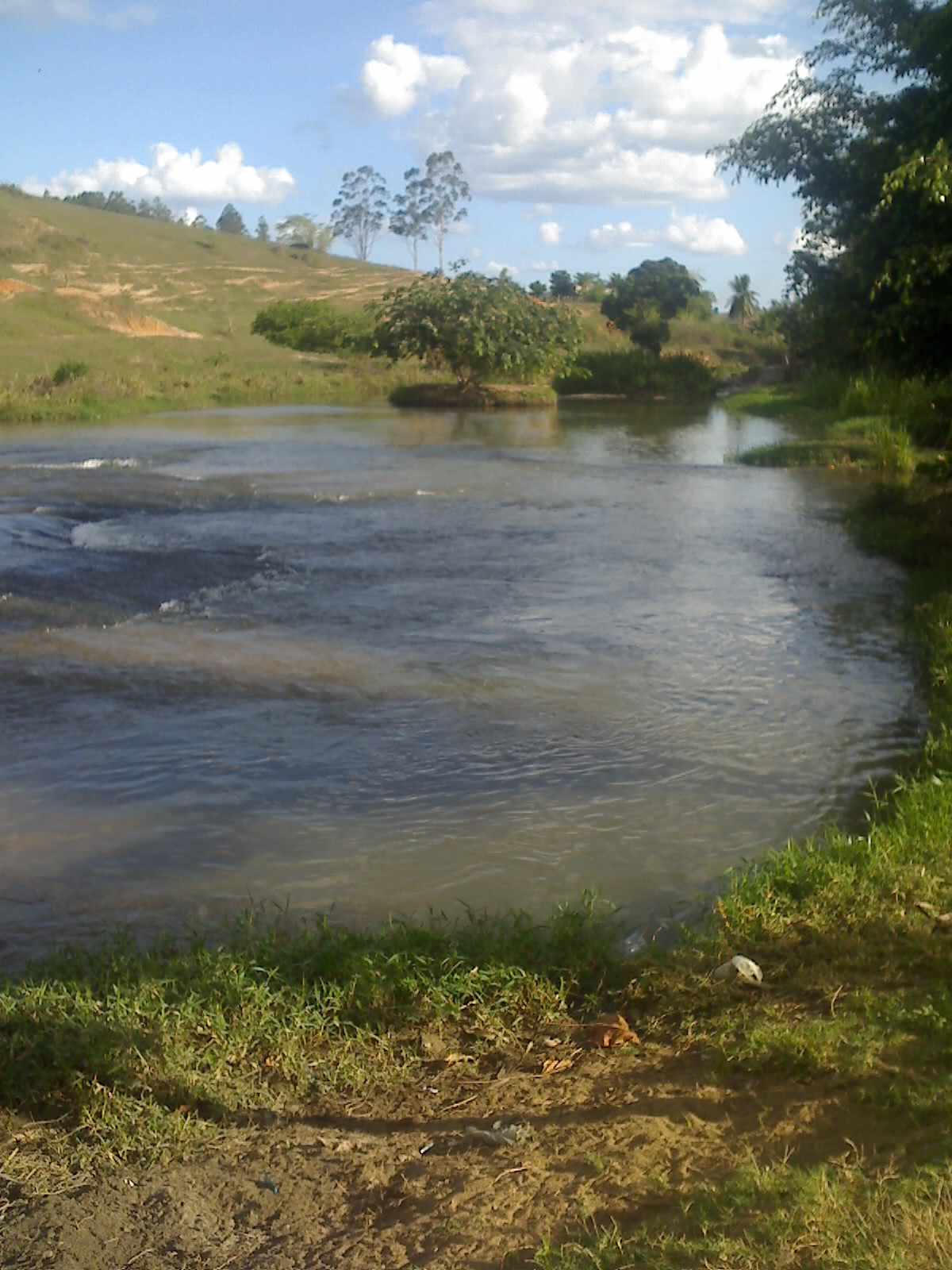 Foto do rio Água Fria